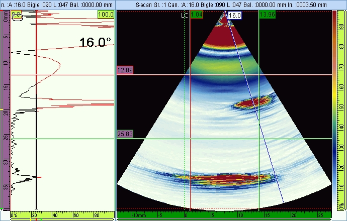 Signaux ultrasonore de type S (sectoriel)